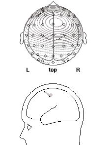 Voorbeeld van de stop-P3. Deze P3 is het grootst op de frontale schedel. Getoond wordt de topografie en de bronoplossing (dipolen die de beste verklaring geven van deze topografie) Eigen werk, publiek domein.